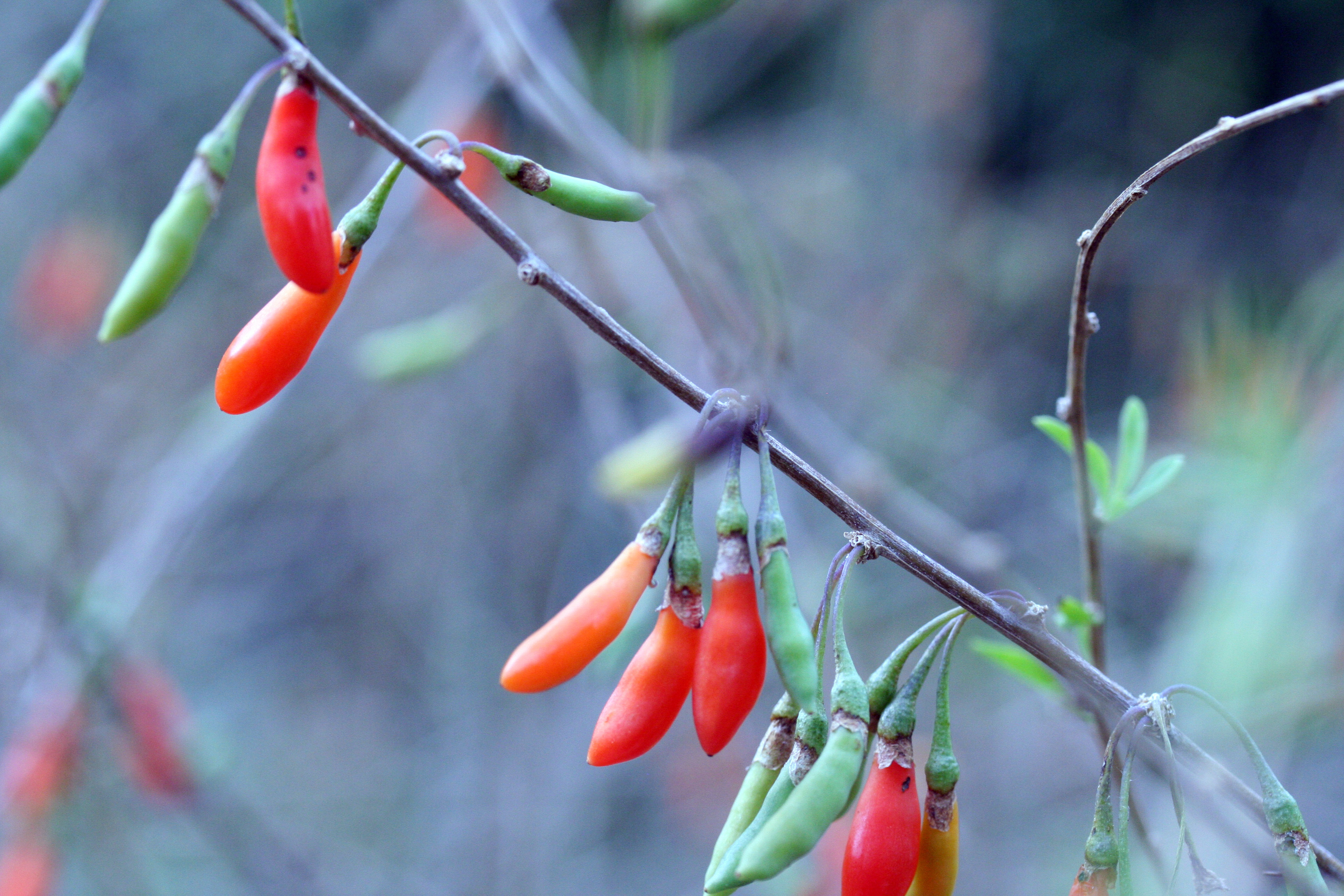 Lycium chinense dans le Jardin Botanique de Marnay sur Seine, Aube, France